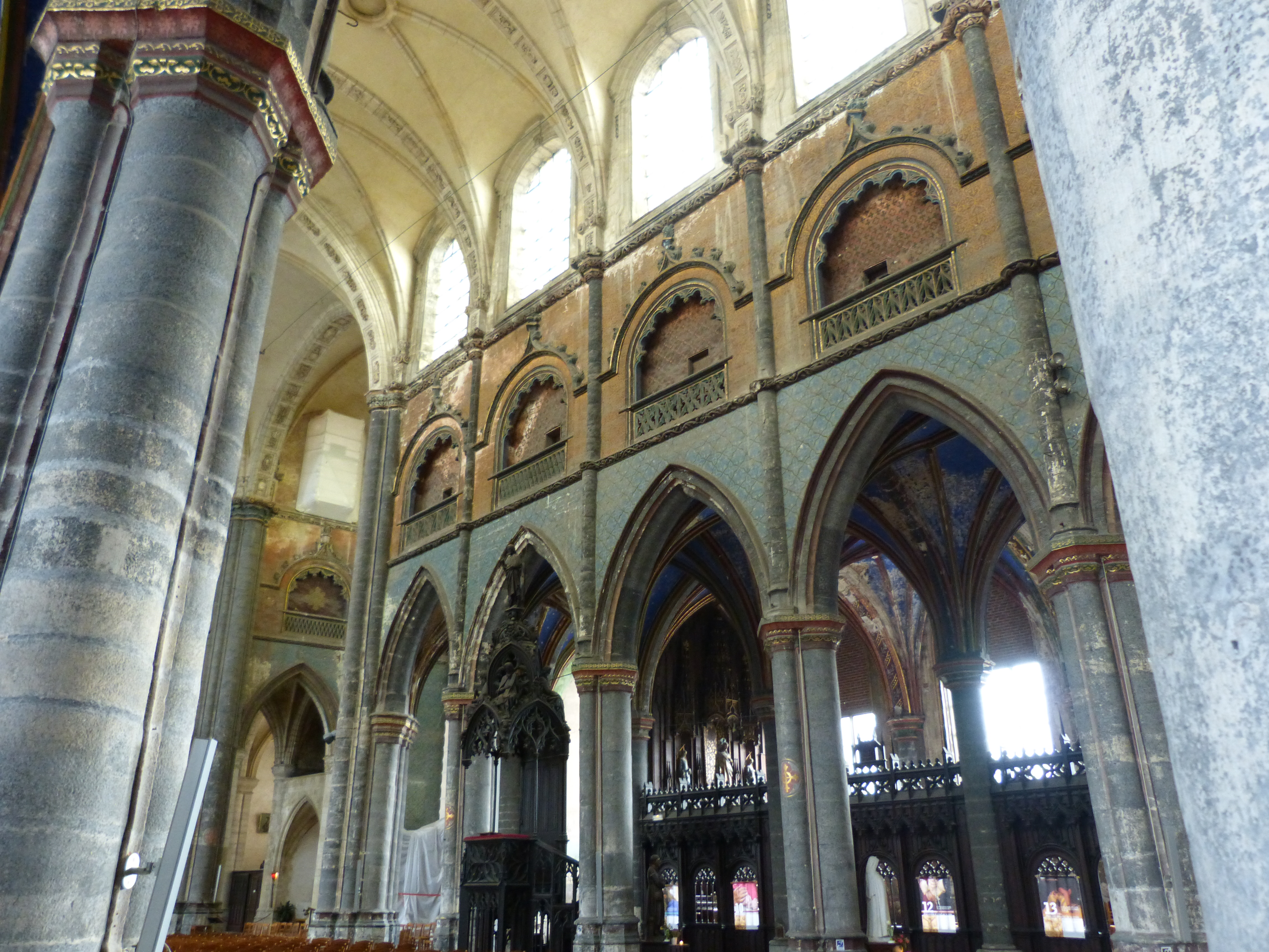 Photo présentant les trois niveaux de la collégiale : grandes arcades, triforium sans accès et fenêtres hautes